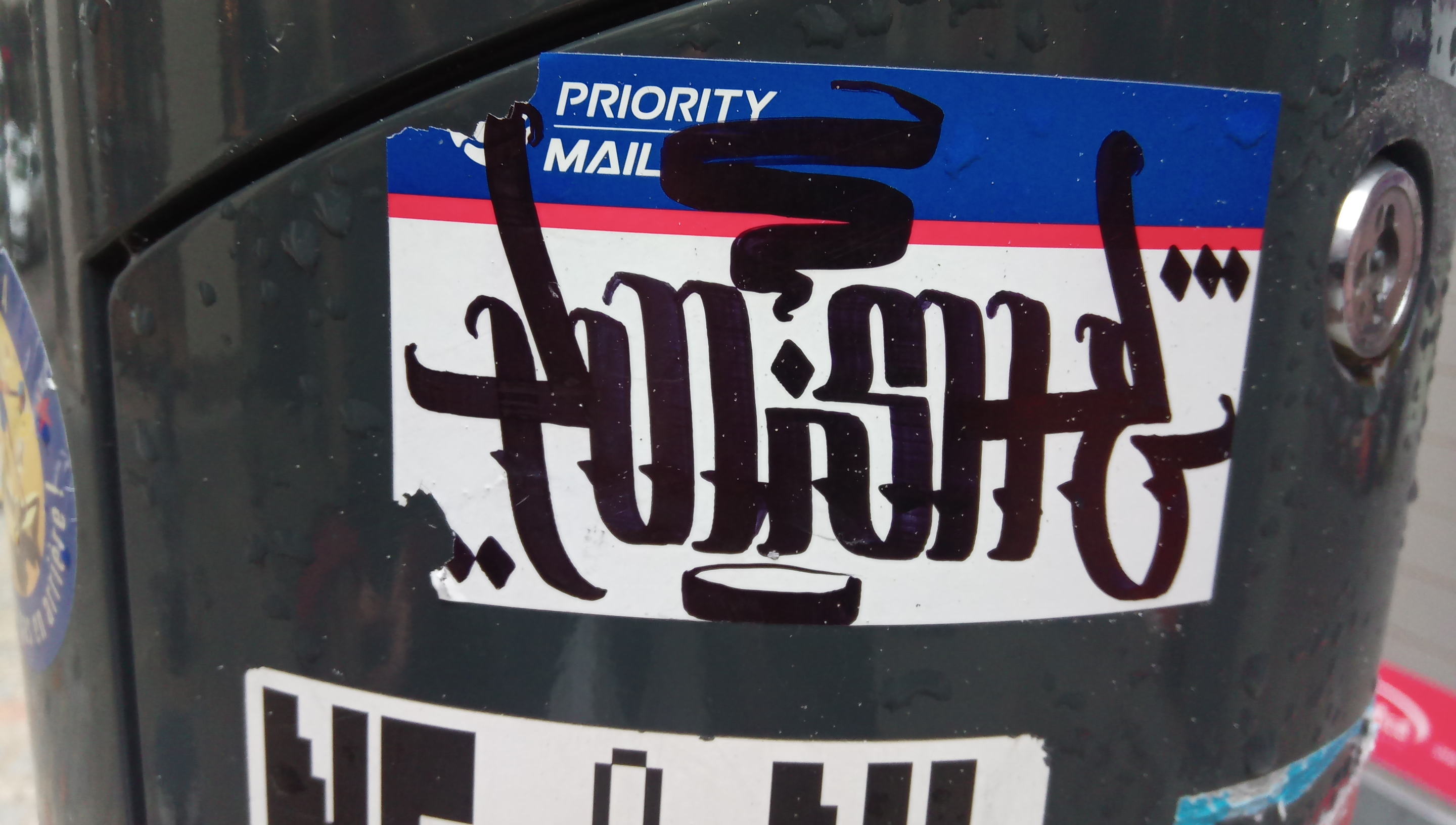 Graff calligraphique - Limoges - Rue du Consulat - 2020 03 10